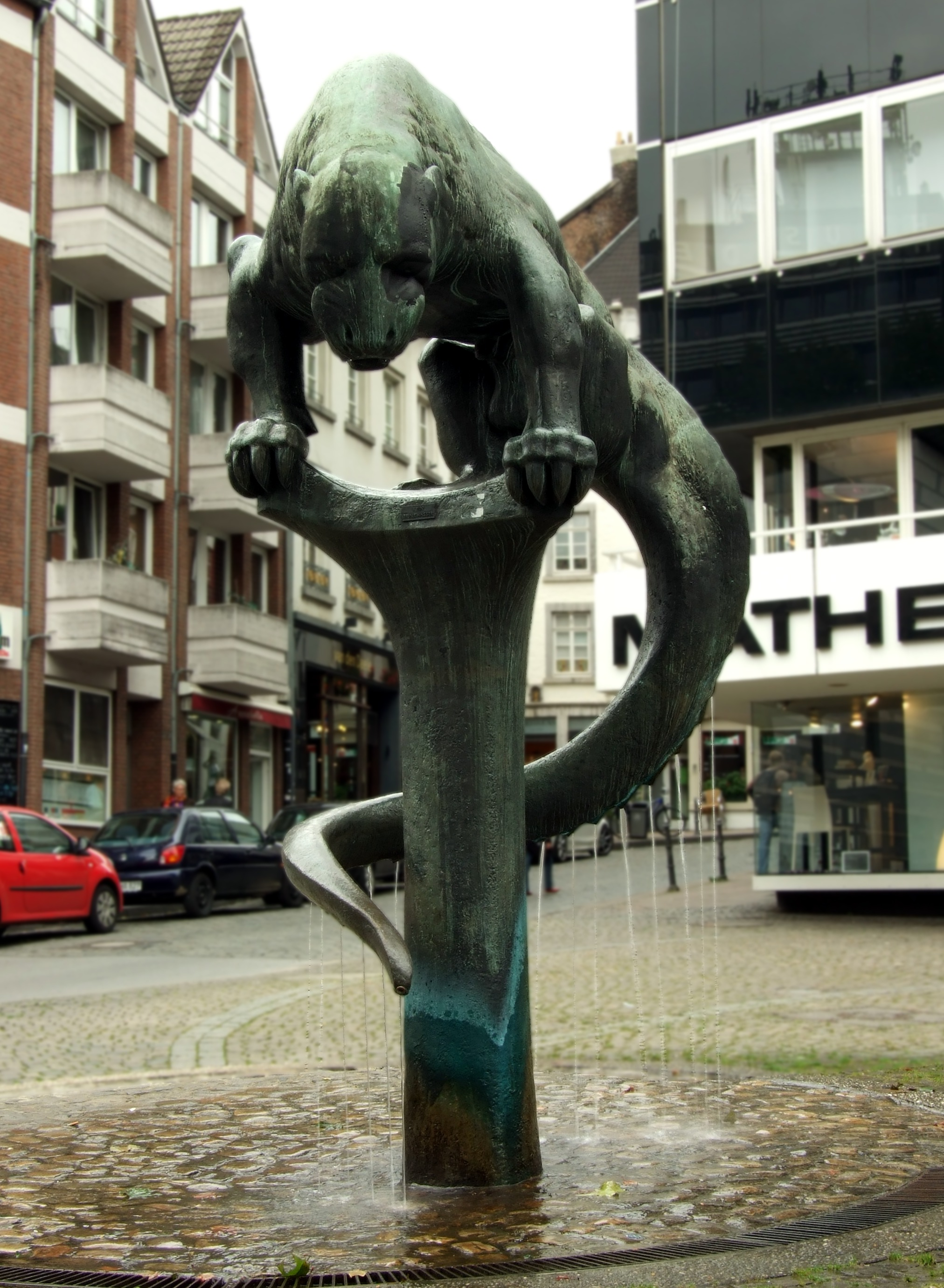 Brunnen/Kreatur „Bahkauv“ in Aachen